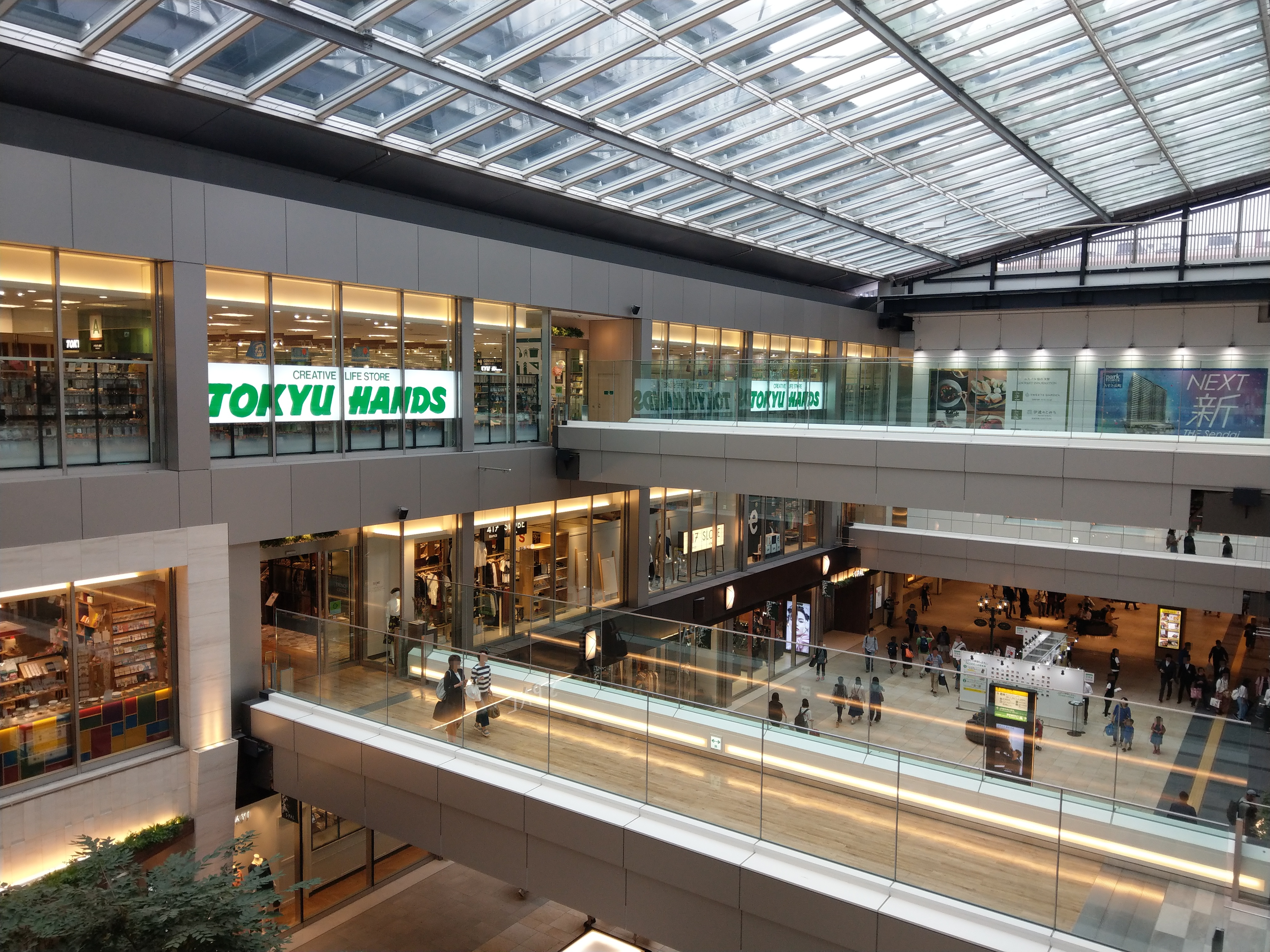 Sendai Station, S PAL